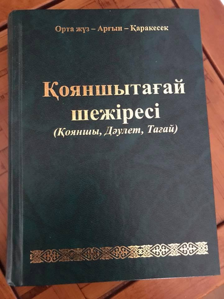 Кояншытагай шежире книга 2018 год.